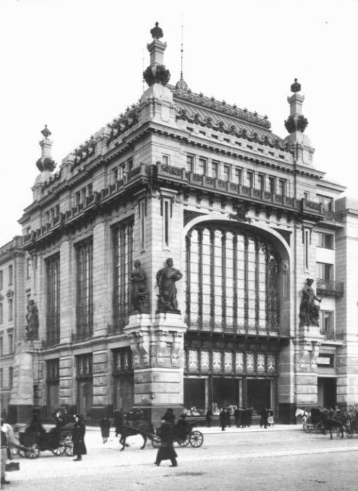 Магазин братьев Елисеевых на Невском проспекте